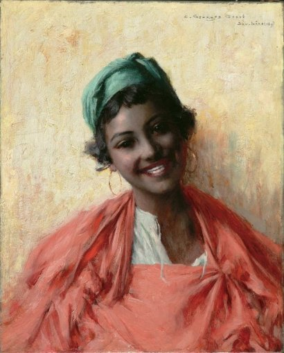 Jeune fille de Bou-Saâda. Huile sur toile